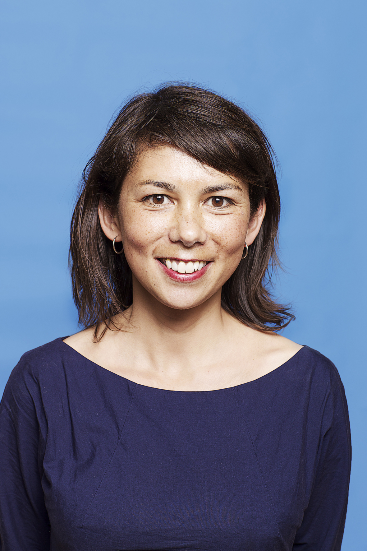 Mei Li Vos, Kandidaat-Kamerlid. Foto: Lex Draijer.